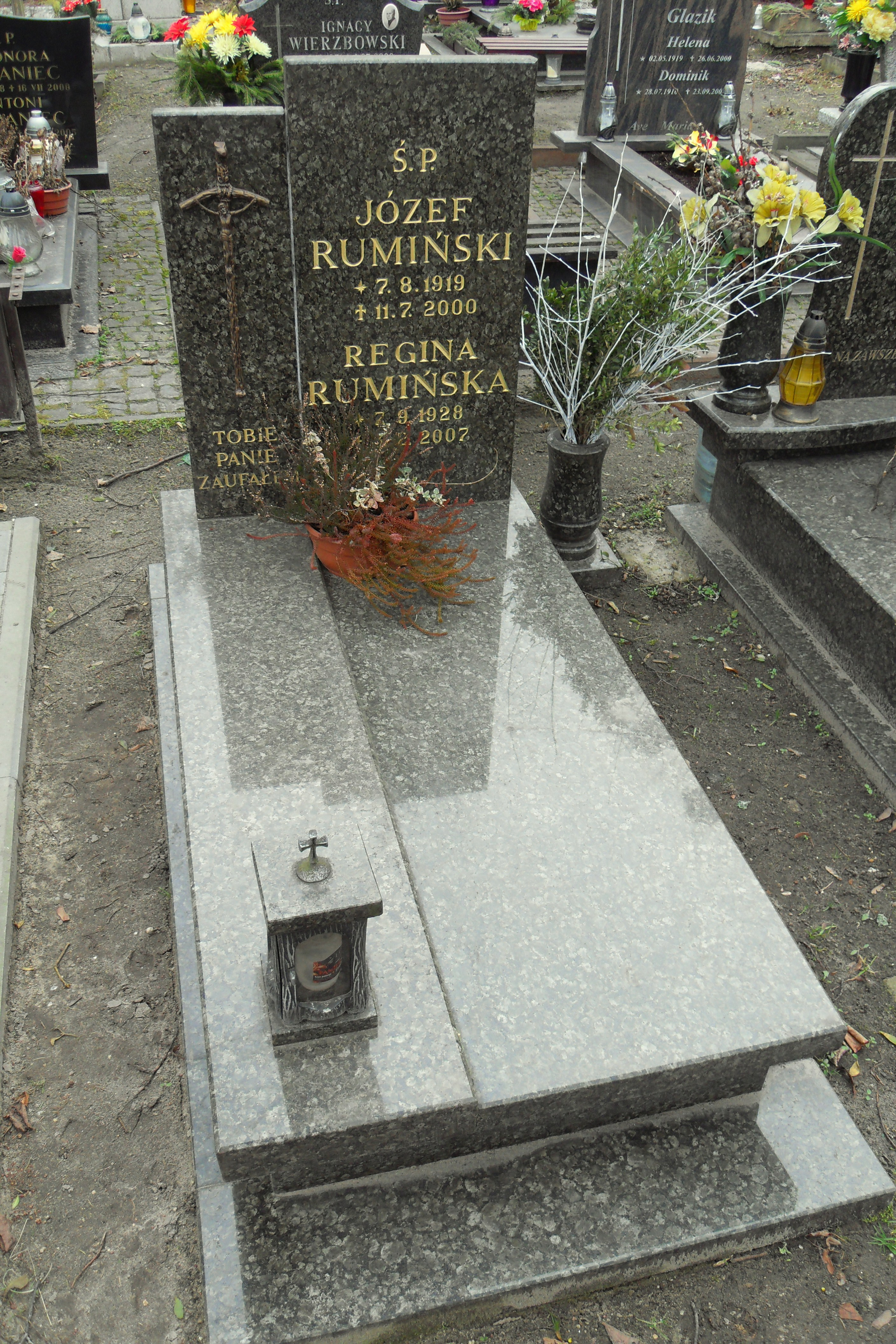 Gdańsk Aniołki. Cmentarz Garnizonowy, grób Józefa Rumińskiego.